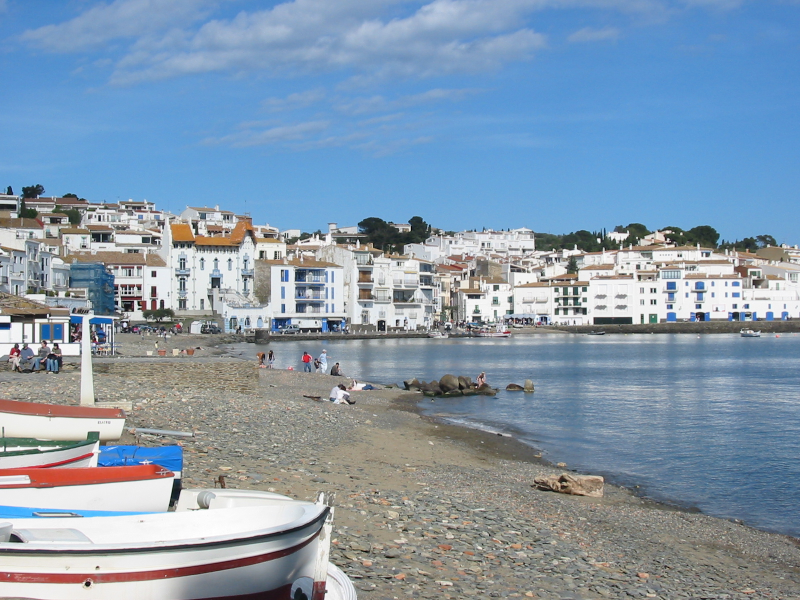 Cadaques harbour, Costa Brava, Catalonia